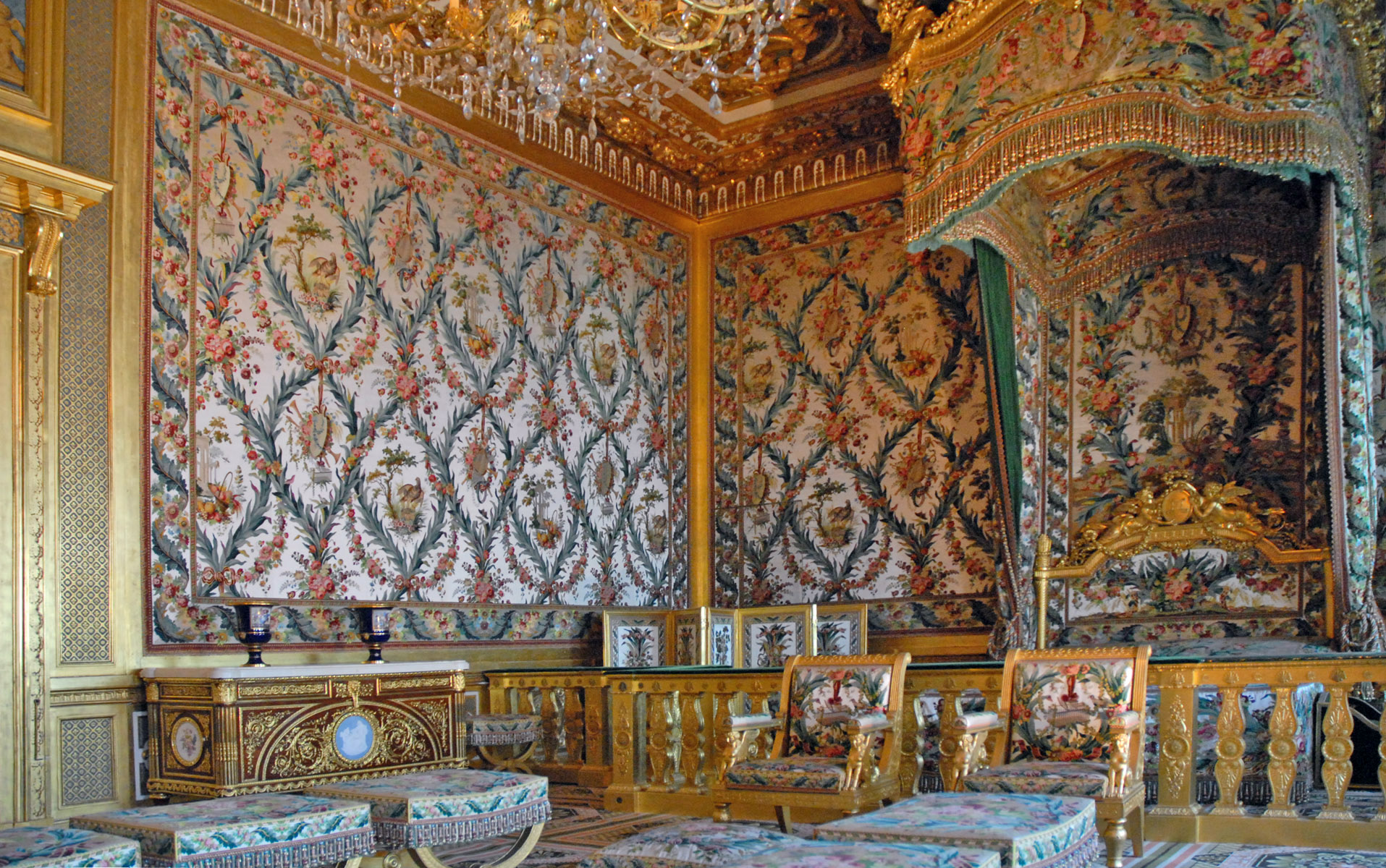 Chateau de Fontaibleau, France Chambre de l'Imperatrice vue d'ensemble Depuis la Reine Marie de Médicis jusqu'à l'Impératrice Eugénie, toutes les souveraines occupèrent cette chambre. Le décor actuel correspond à différentes époques. Le mobilier est celui que connut l'Impératrice Joséphine. Le lit fut exécuté pour Marie-Antoinette qui n'eut pas le temps de l'utiliser. Les murs sont recouverts d'un lampas broché, retissé à l'identique et qui garnit aussi les fauteuils d'apparat attribués à Jacob Frères et les tabourets livrés par Jacob-Desmalter. Le château de Fontainebleau offre le souvenir de plus de 700 ans de présence des souverains de France, de l’intronisation de Louis VII en 1137 à la chute du Second Empire en 1870.